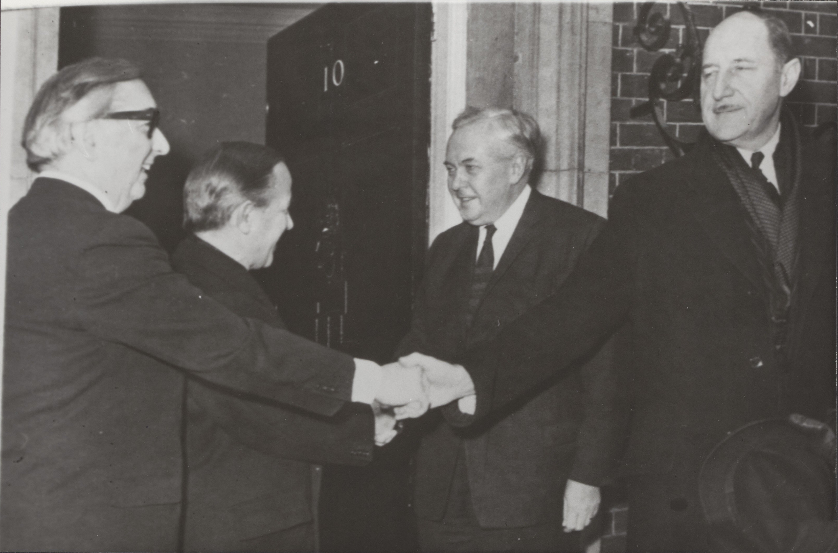 Collectie / Archief : Fotocollectie Elsevier Reportage / Serie : [ onbekend ] Beschrijving : minister-presidenten, bezoeken, ministers, Brown George, Luns, J.A.M.H., Groot-Brittannië Datum : 19 februari 1968 Locatie : Groot-Brittannië, Londen Trefwoorden : bezoeken, minister-presidenten, ministers Persoonsnaam : Brown George, Jong, Piet de, Luns, J.A.M.H., Luns, Joseph, Wilson, Harold Fotograaf : Fotograaf Onbekend / Anefo Auteursrechthebbende : Nationaal Archief Materiaalsoort : Foto (zwart/wit) Nummer archiefinventaris : bekijk toegang 2.24.05.02 Bestanddeelnummer : 083-0797